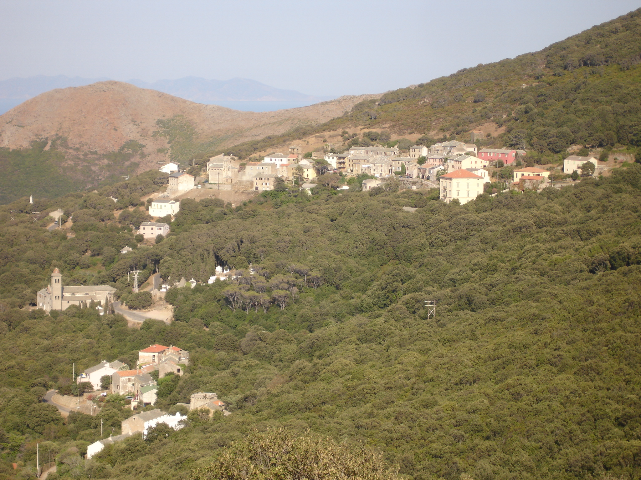 France, Haute-Corse (2B), Ersa, hameau de Boticella